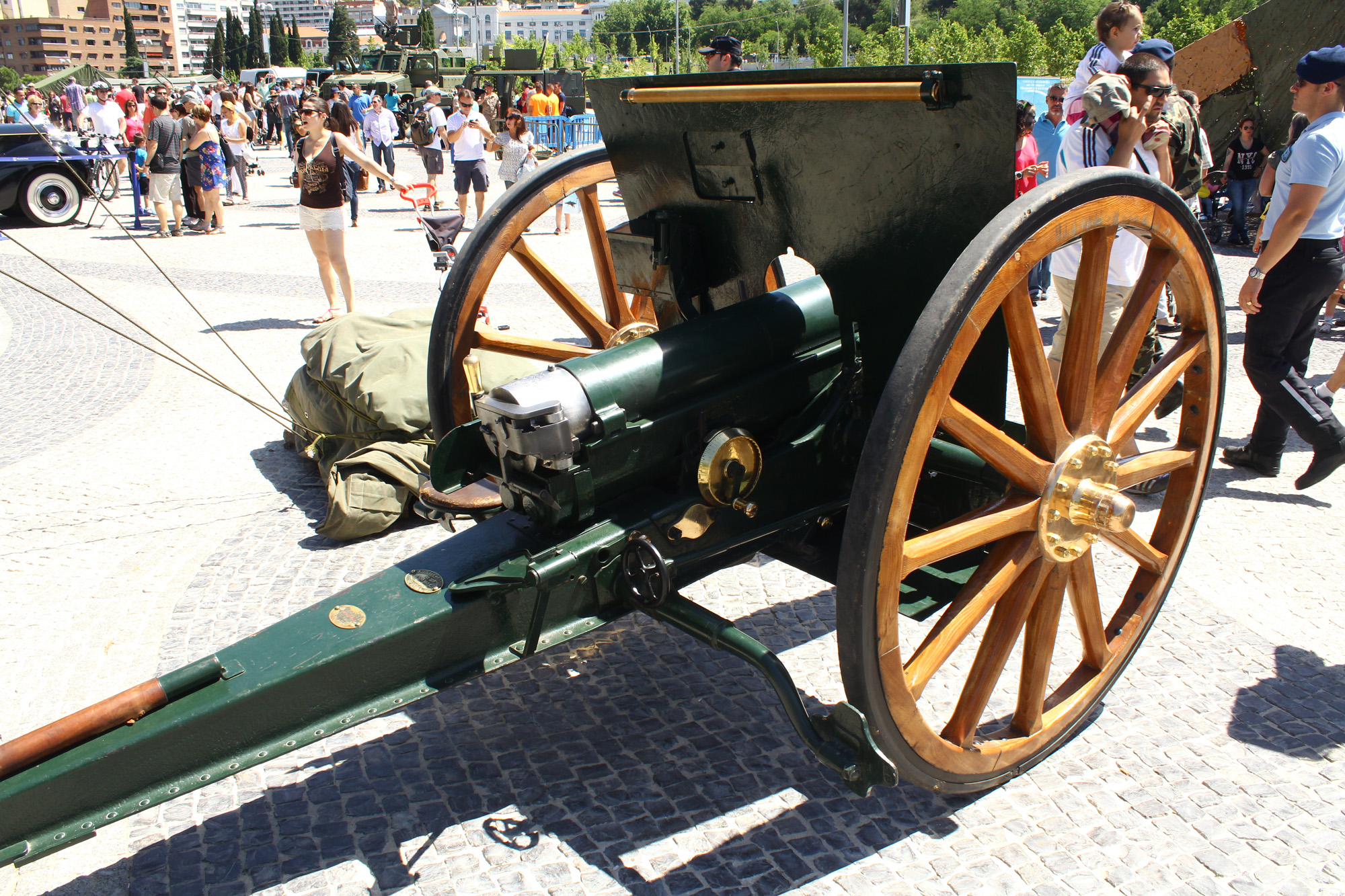 Exposición en Madrid Río con motivo del Día de las Fuerzas Armadas. Domingo 8 de junio de 2014.